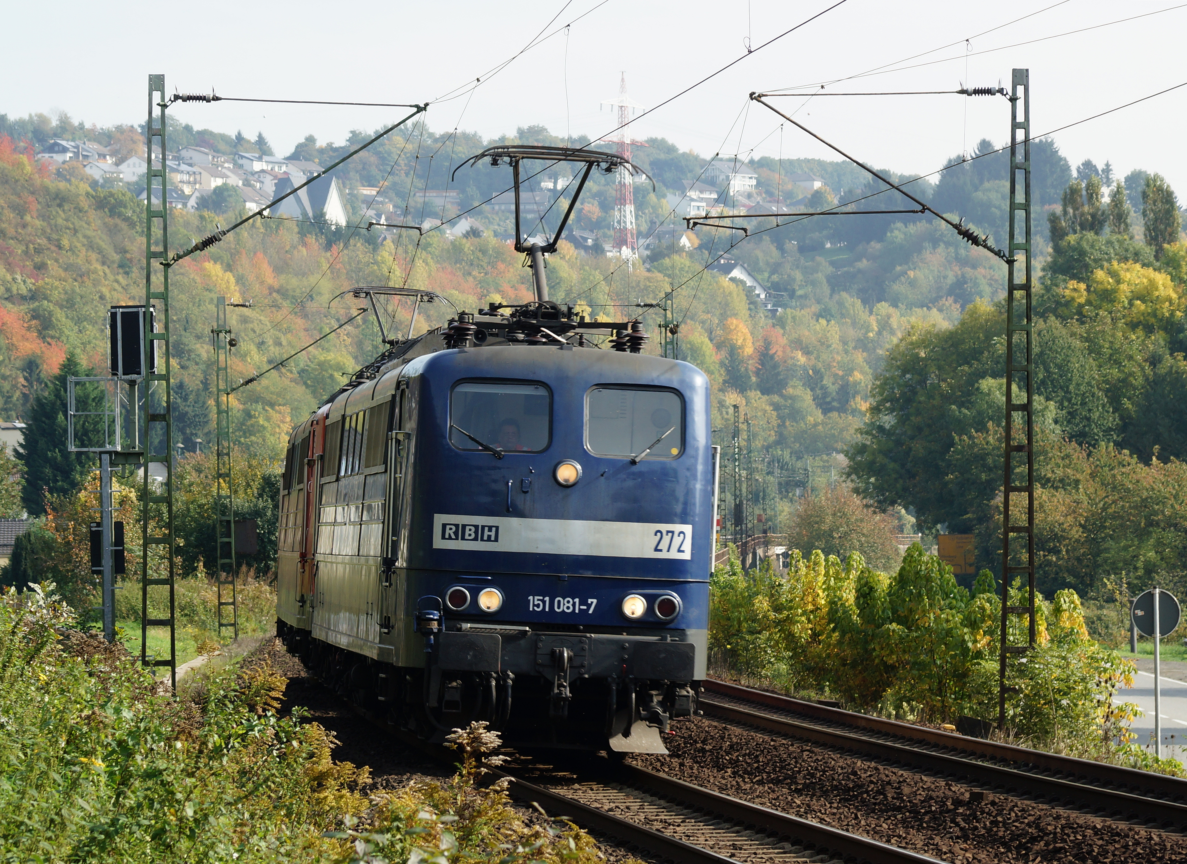 RBH 272, 151 081-7 in Erpel am Rhein